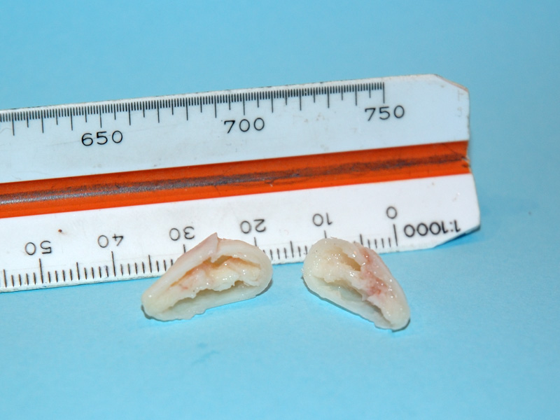 Grützbeutel offen